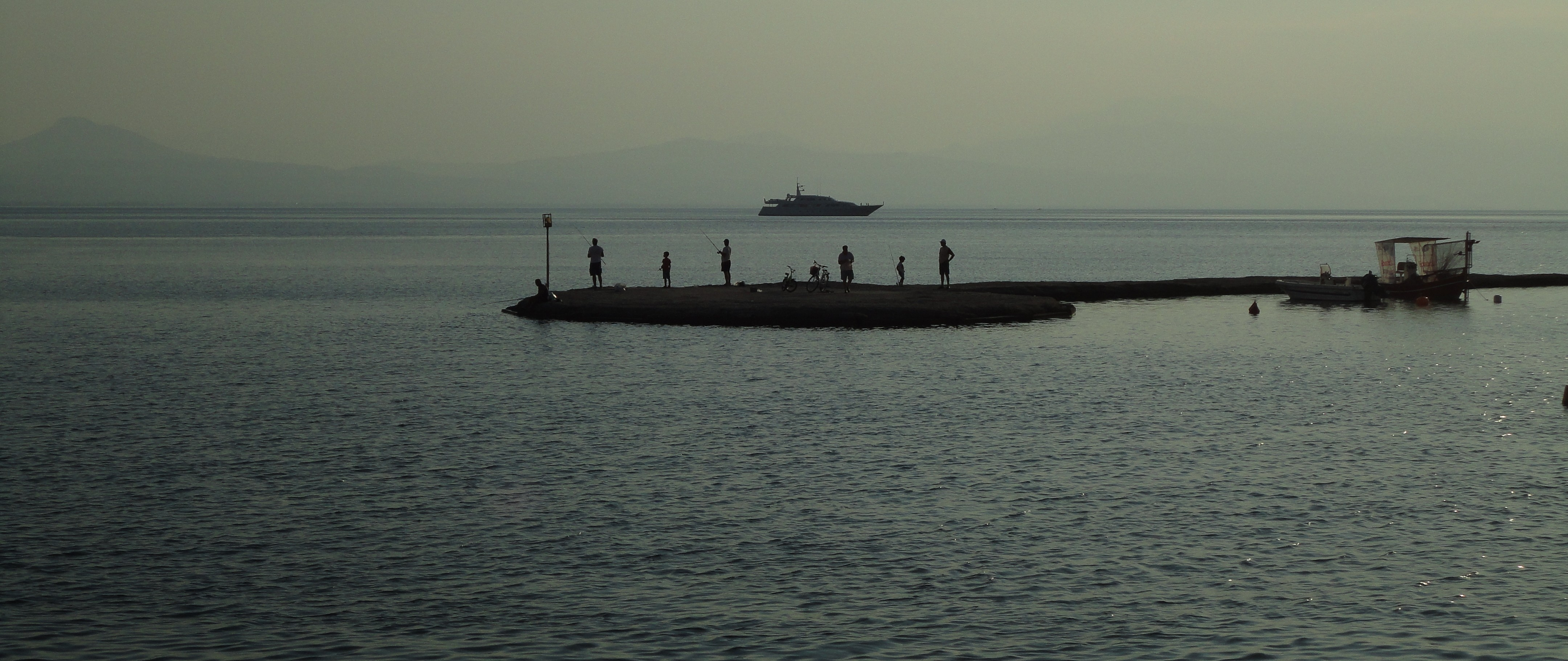 Loutraki Beach